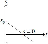 Gráfico da função da equação horária dos Espaços do Movimento Uniforme, para um movimento retrógrado cujo espaço é incialmente positivo.